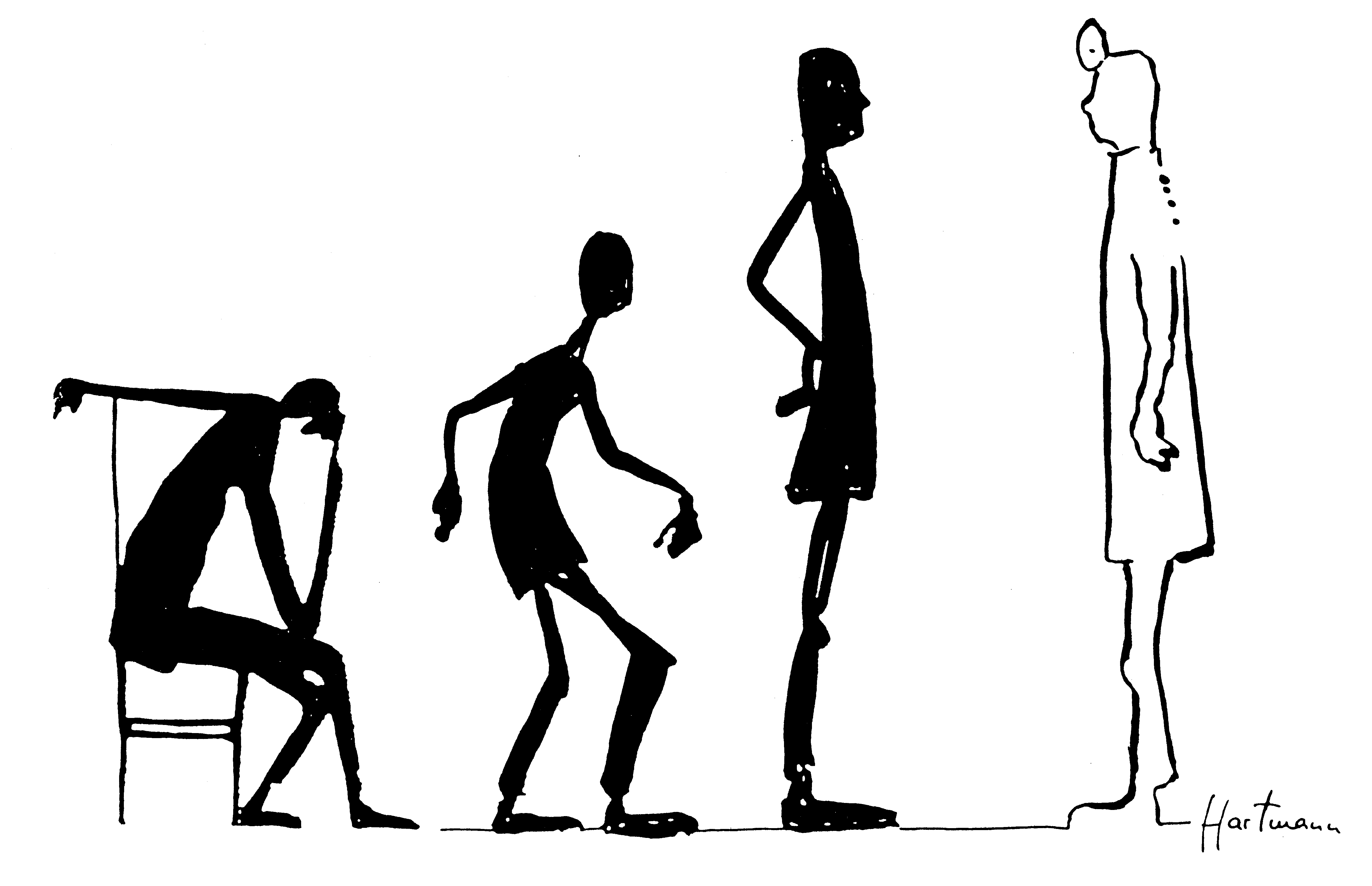 Alternatives Logo der Bundesarbeitsgemeinschaft der PatientInnenstellen und -initiativen